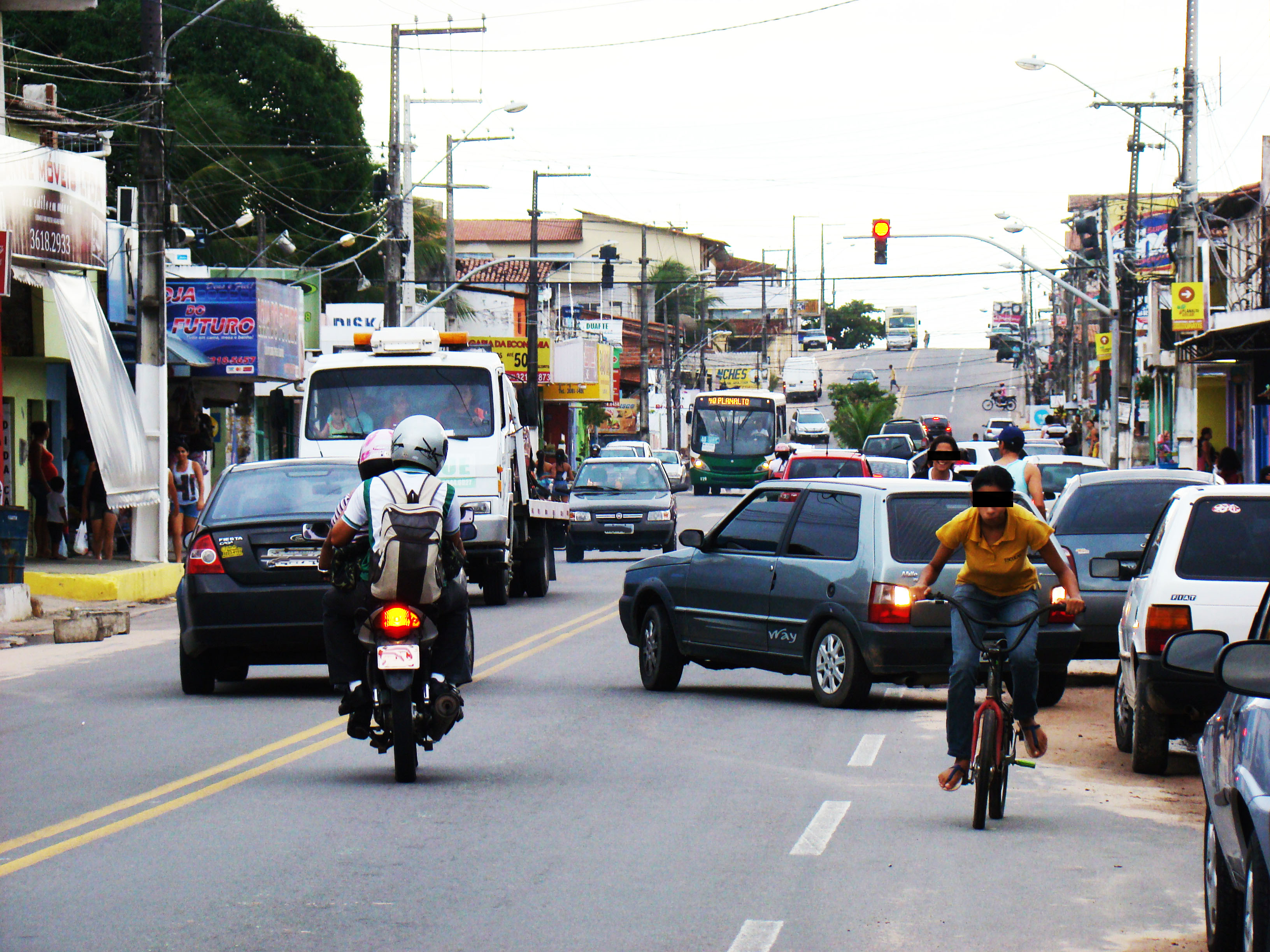 Urbanização